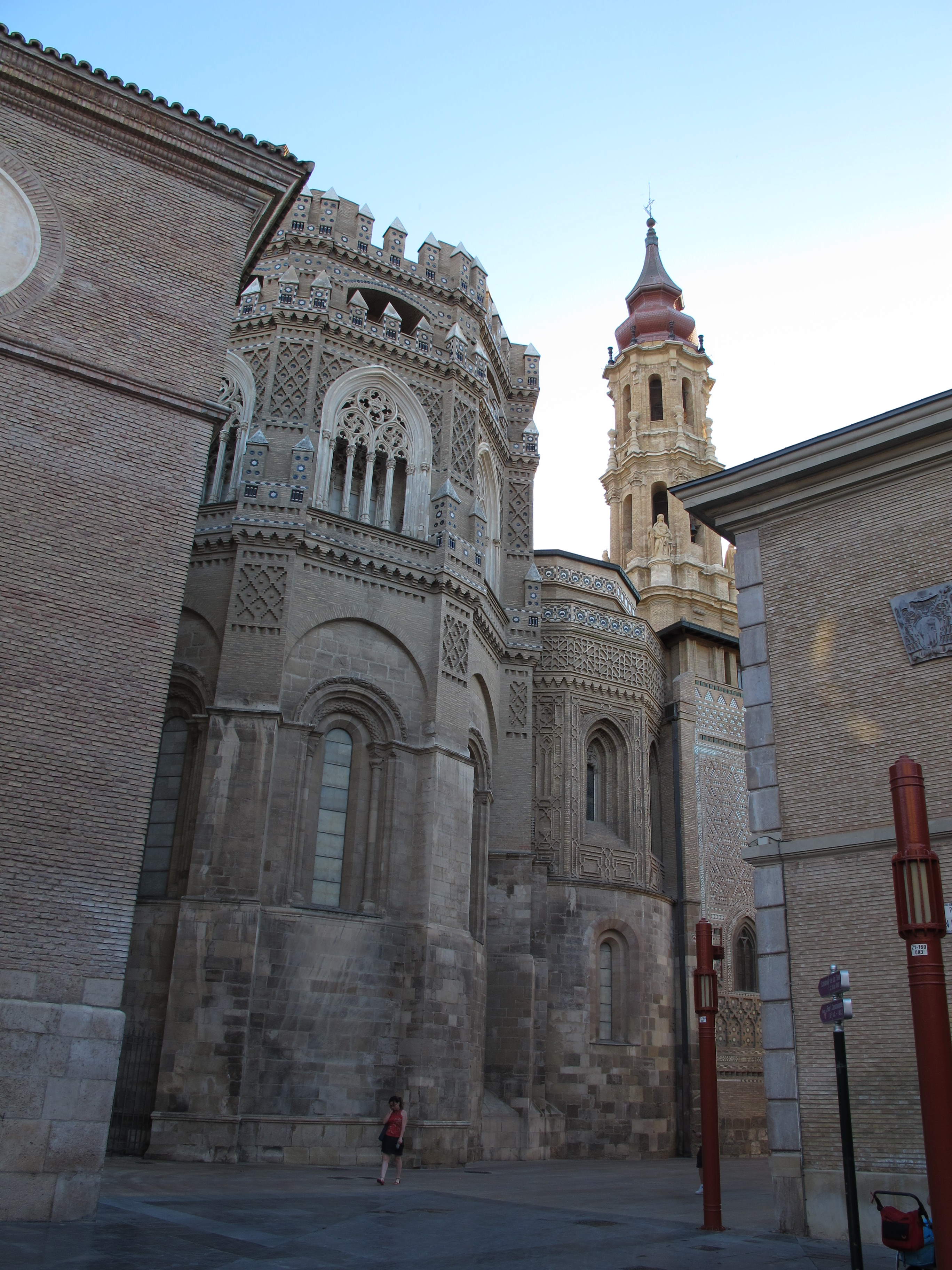 Zaragoza (Spanien): Alte Kathedrale ("La Seo"), Apsiden und Außenmauer im Mudéjar-Stil, im Hintergrund der barocke Glockenturm